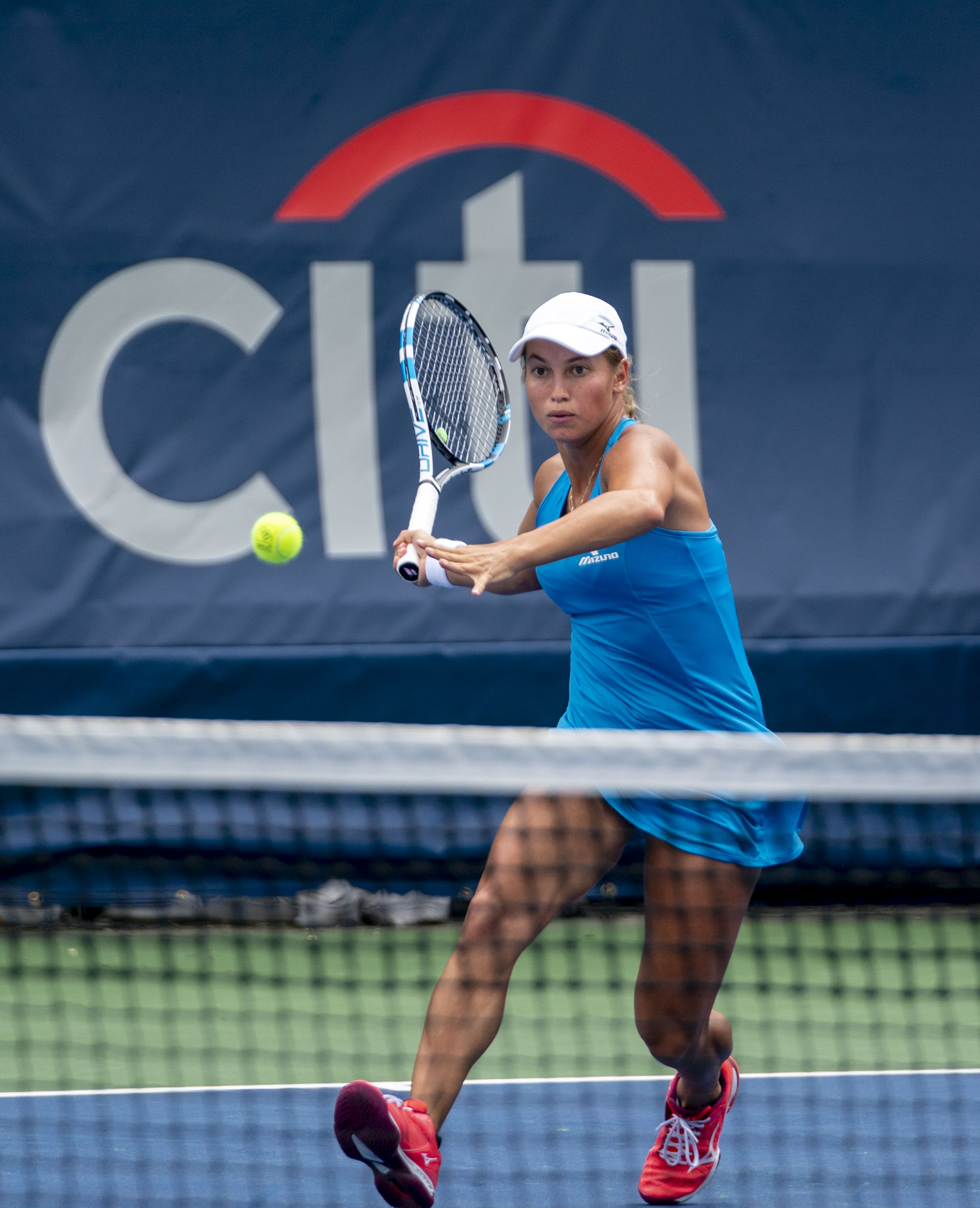 2018 Citi Open Tennis